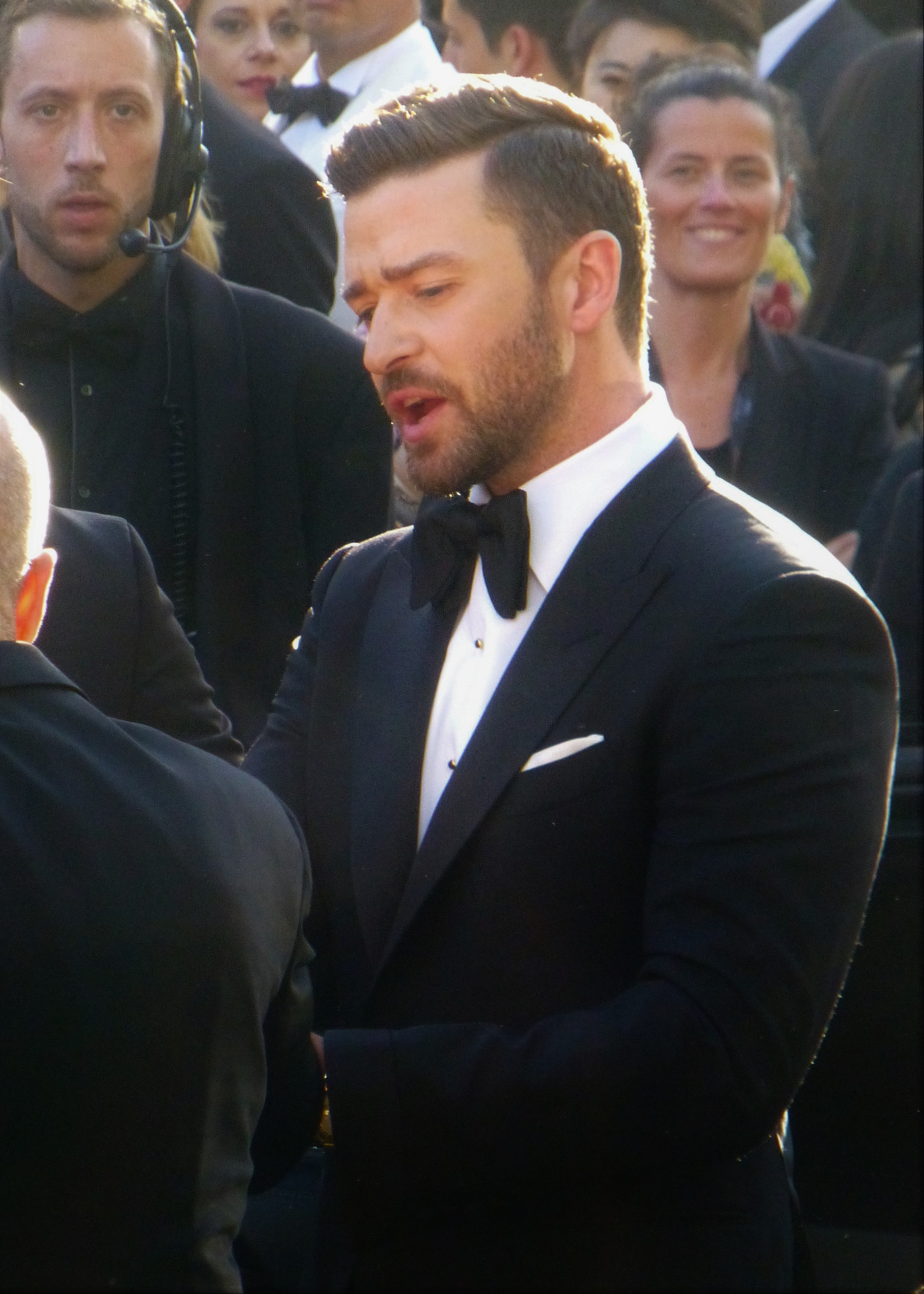 El músico y actor Justin Timberlake promocionando la película Trolls en el Festival de Cine de Cannes 2016.